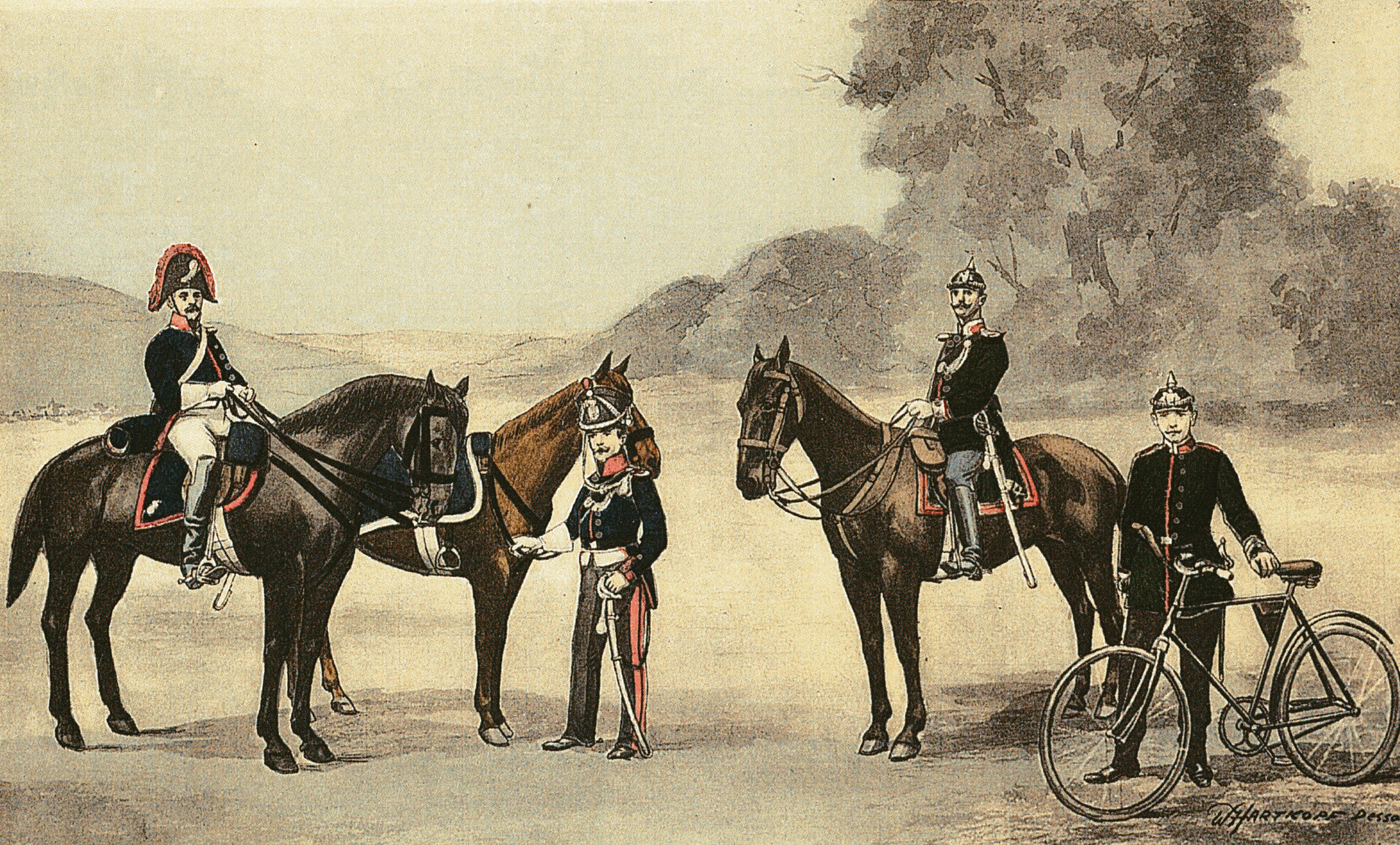 Anhaltische Gendarmen und Angehörige der Jägerbrigade 1810 bis 1910. Links ein Gendarm aus Anhalt-Dessau von 1810, rechts von ihm ein Gendarm aus Cöthen-Bernburg um 1840. Rechte Bildhälfte zwei Jäger der Jägerbrigade (Gendarmerie) von Anhalt-Dessau 1910